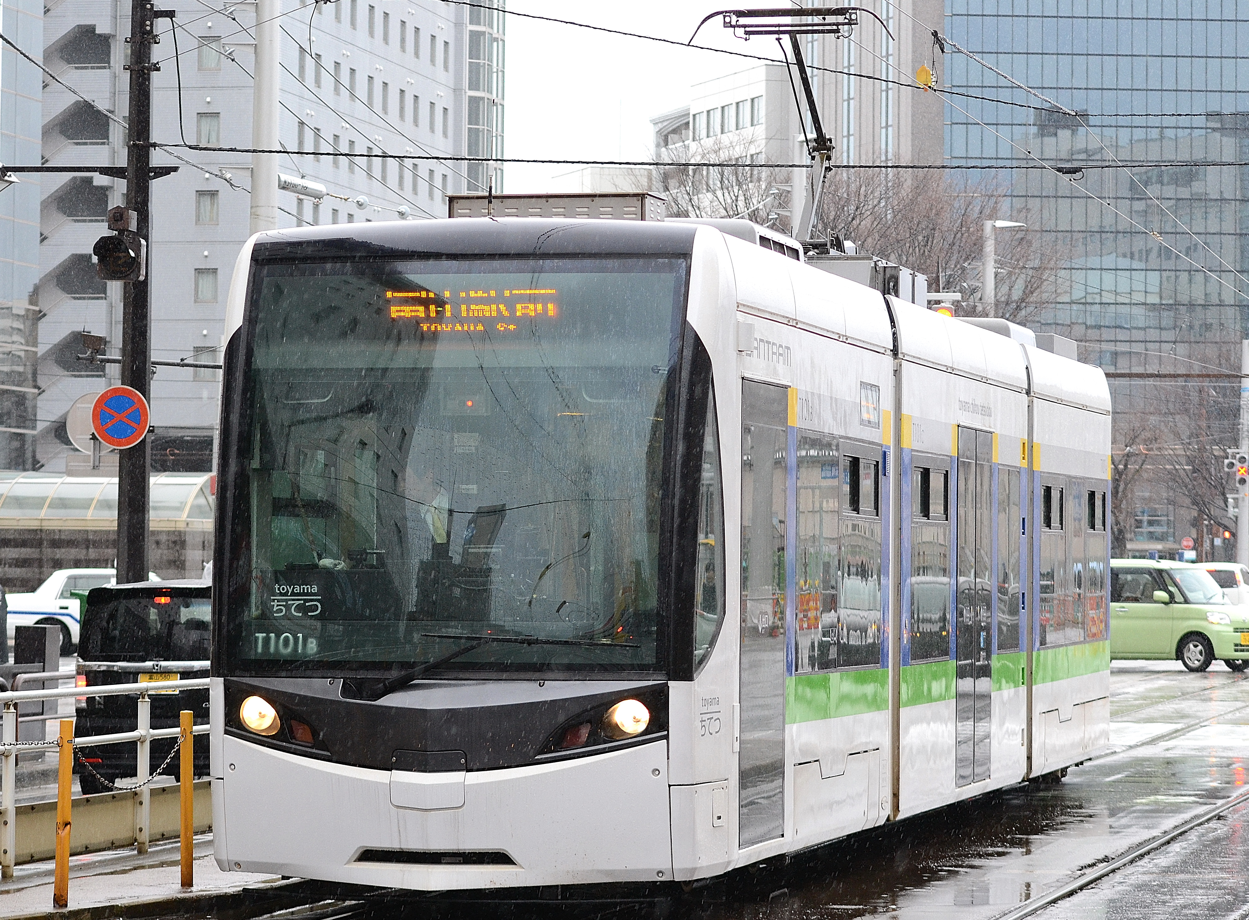 富山地方鉄道市内軌道線、富山駅前に停車中のT100形